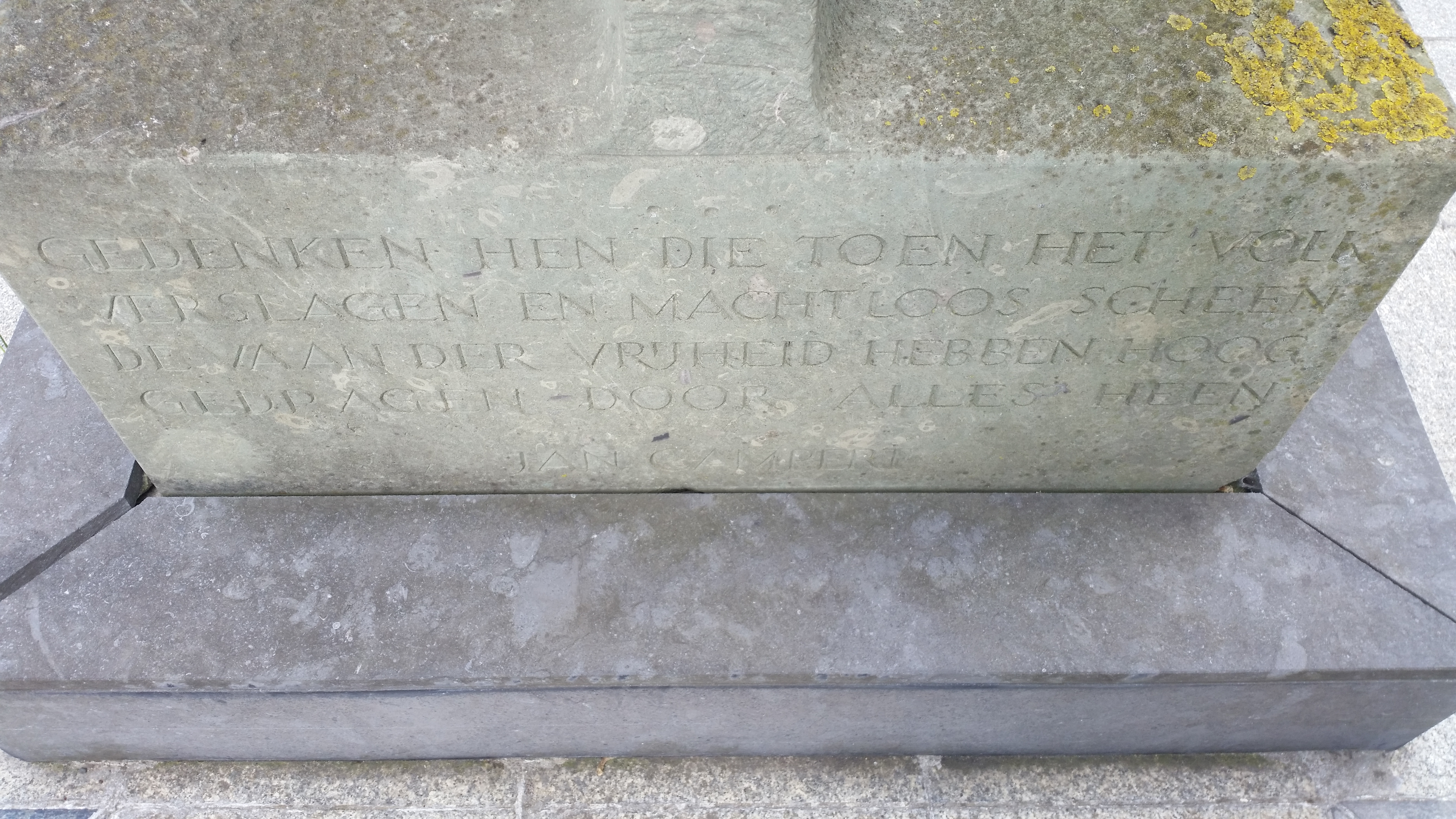 Tekst Jan Campert op standbeeld Koningin Wilhelmina van Onkenhout